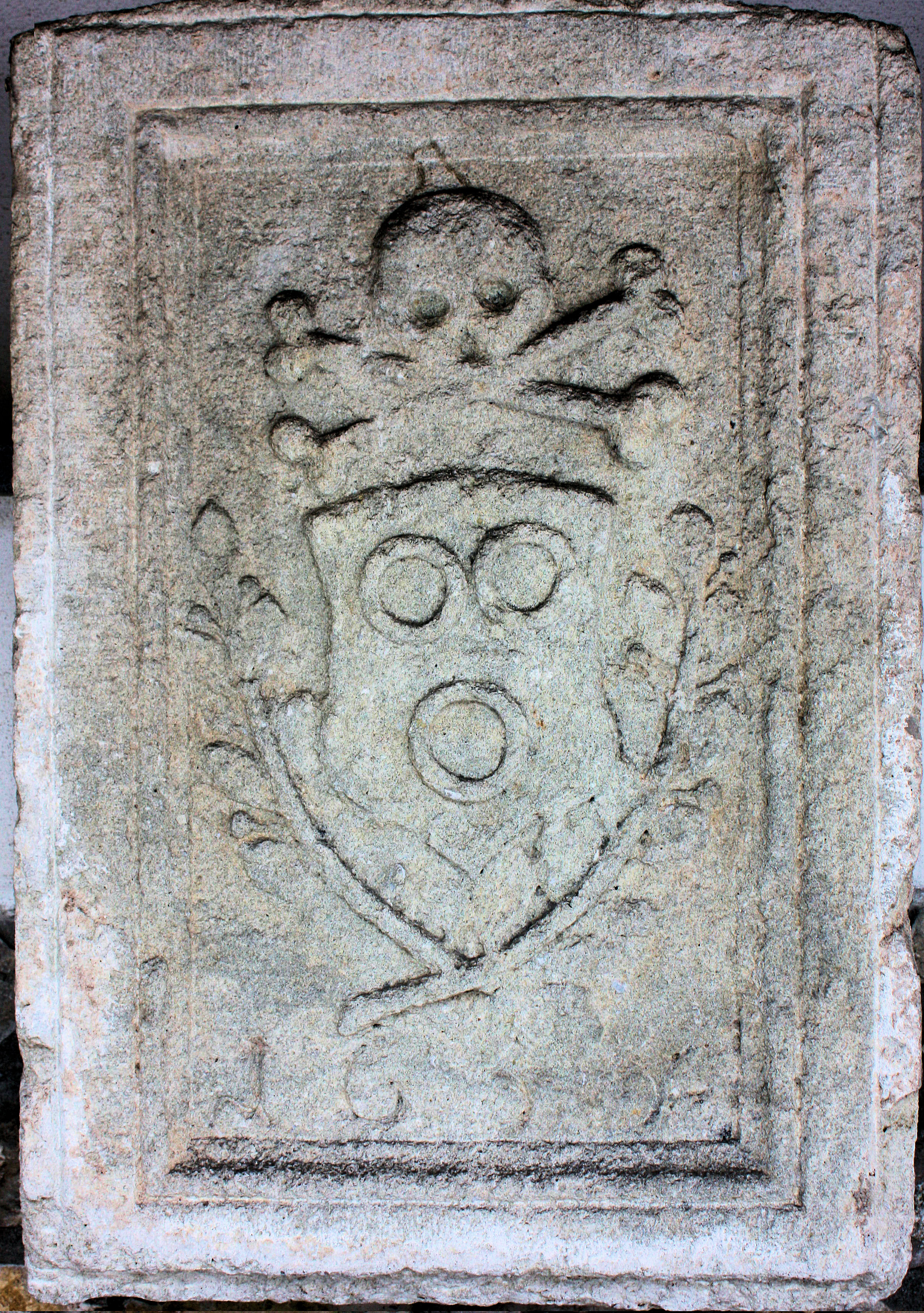 Kardiotaph des Fürstbischofs Johann Franz von Schönau von 1656 an der Mauer des Gottesackers in Waldshut mit der Darstellung eines Totenkopfes über dem mit Lorbeer eingerahmten Familienwappen derer von Schönau und der Jahreszahl 1656.